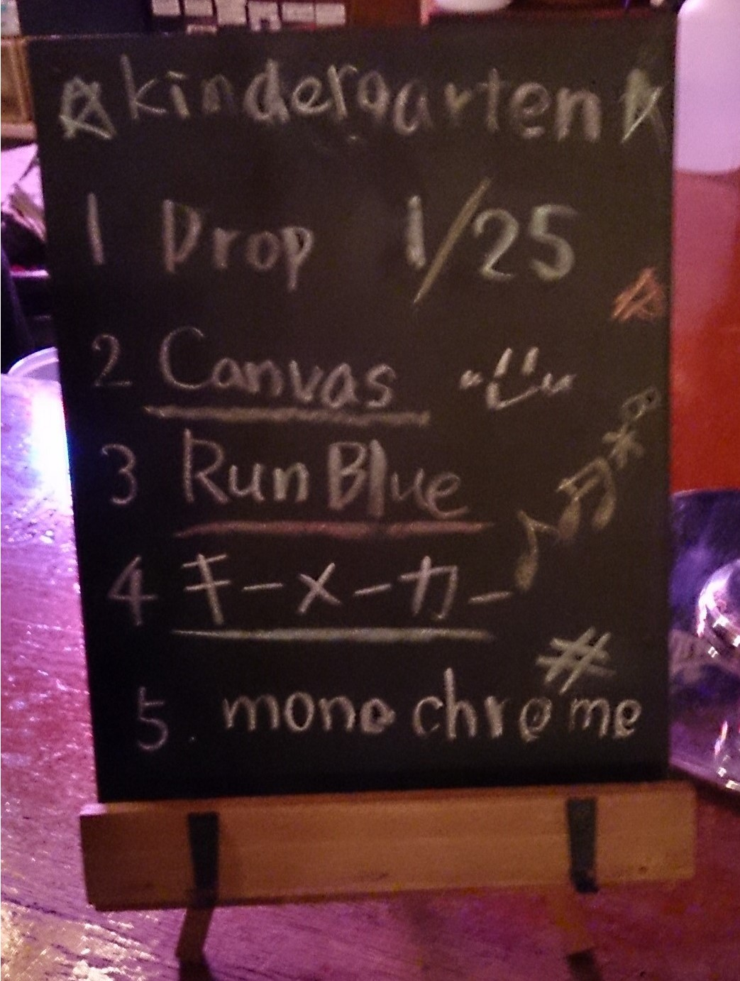 amiinaセトリボード(20150125(1))